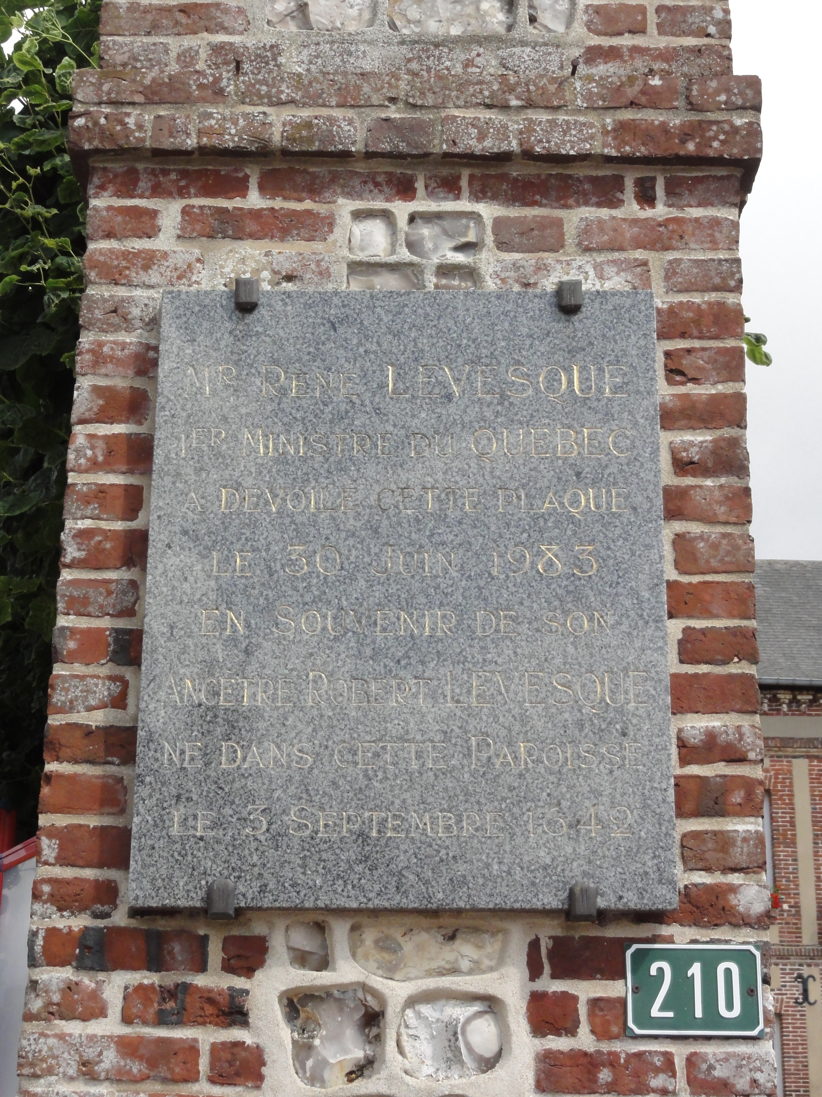 Hautot-Saint-Sulpice (Seine-Mar.) plaque à la mairie